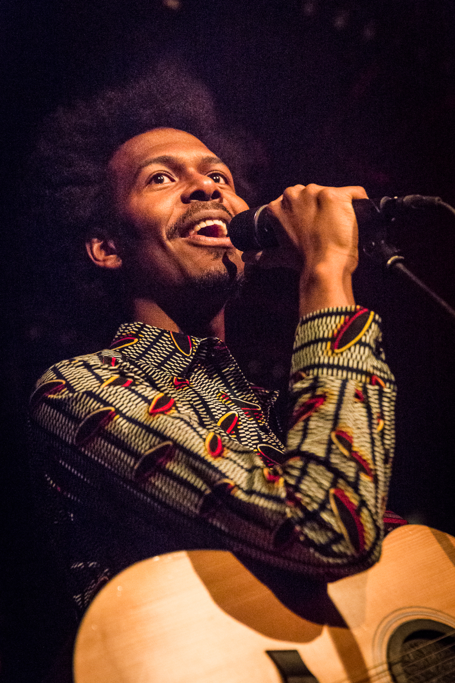 Jeangu Macrooy bij de release show van zijn debuut album 'High On You' in Bitterzoet, Amsterdam.